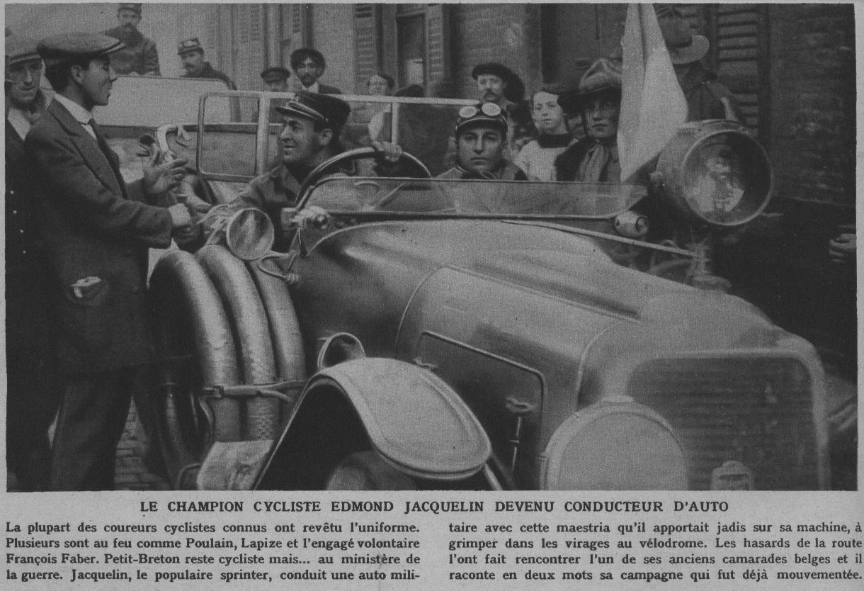 Edmond Jacquelin, cycliste appelé sous les drapeau pour la première guerre mondiale en tant que condusteur d'automobile.